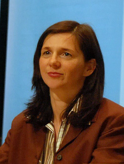 Präses Katrin Göring-Eckardt bei der EKD-Synode am 2. Mai 2009 in Würzburg